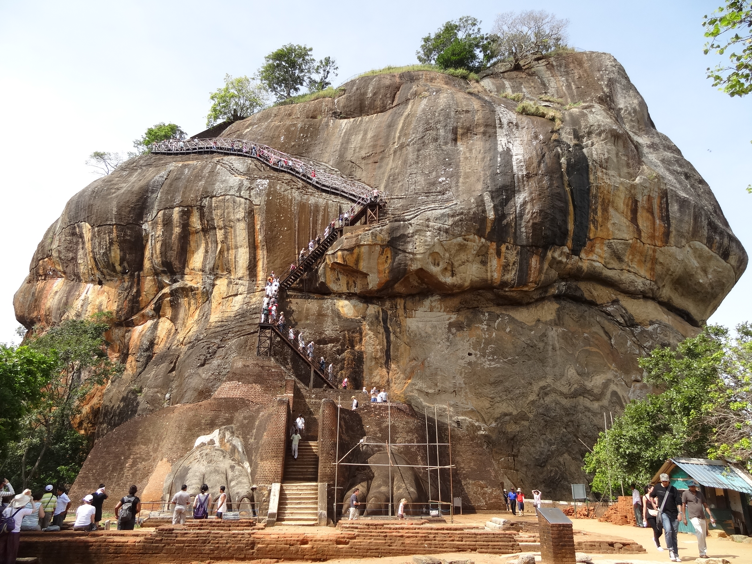 Sigiriya lion gate